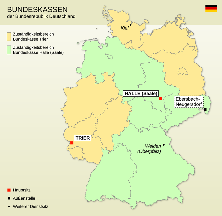 Dienstsitze und Zuständigkeitsbereiche der Bundeskassen der Bundesrepublik Deutschland